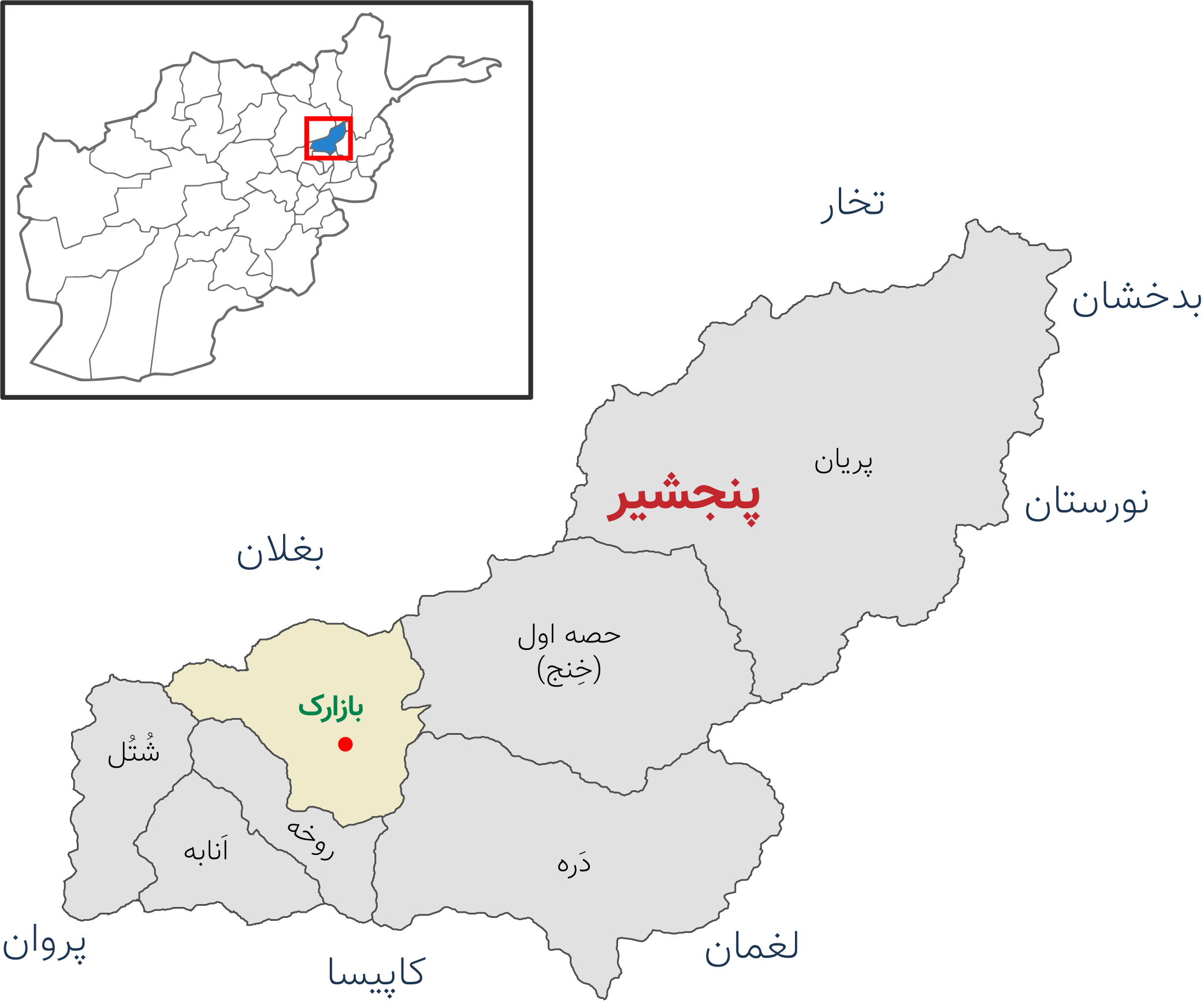 نقشه ولایت پنجشیر